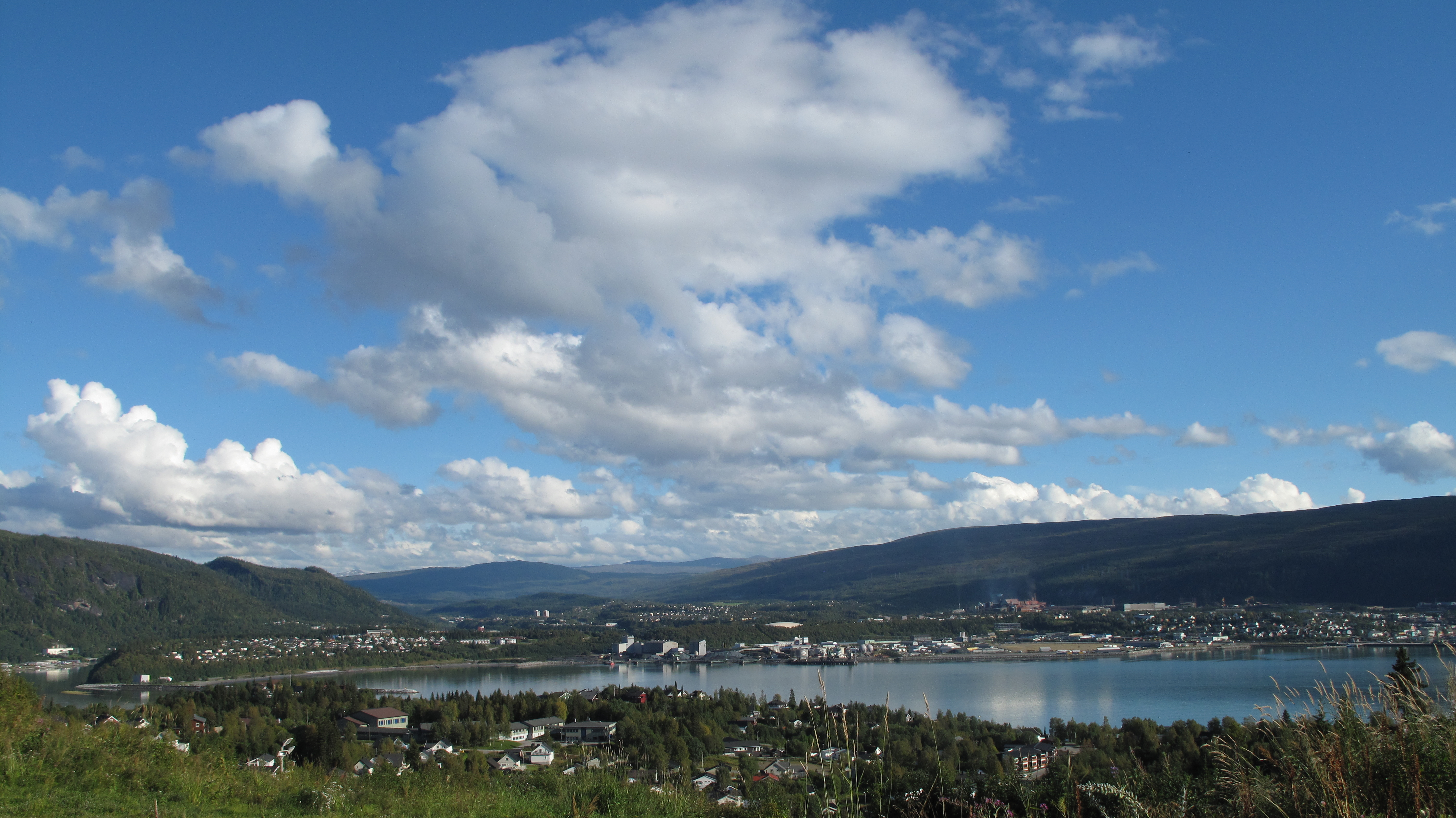 Mo i Rana